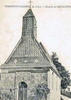 Ancienne photo de la chapelle de la Chevalette, à Fondettes-Vallières.